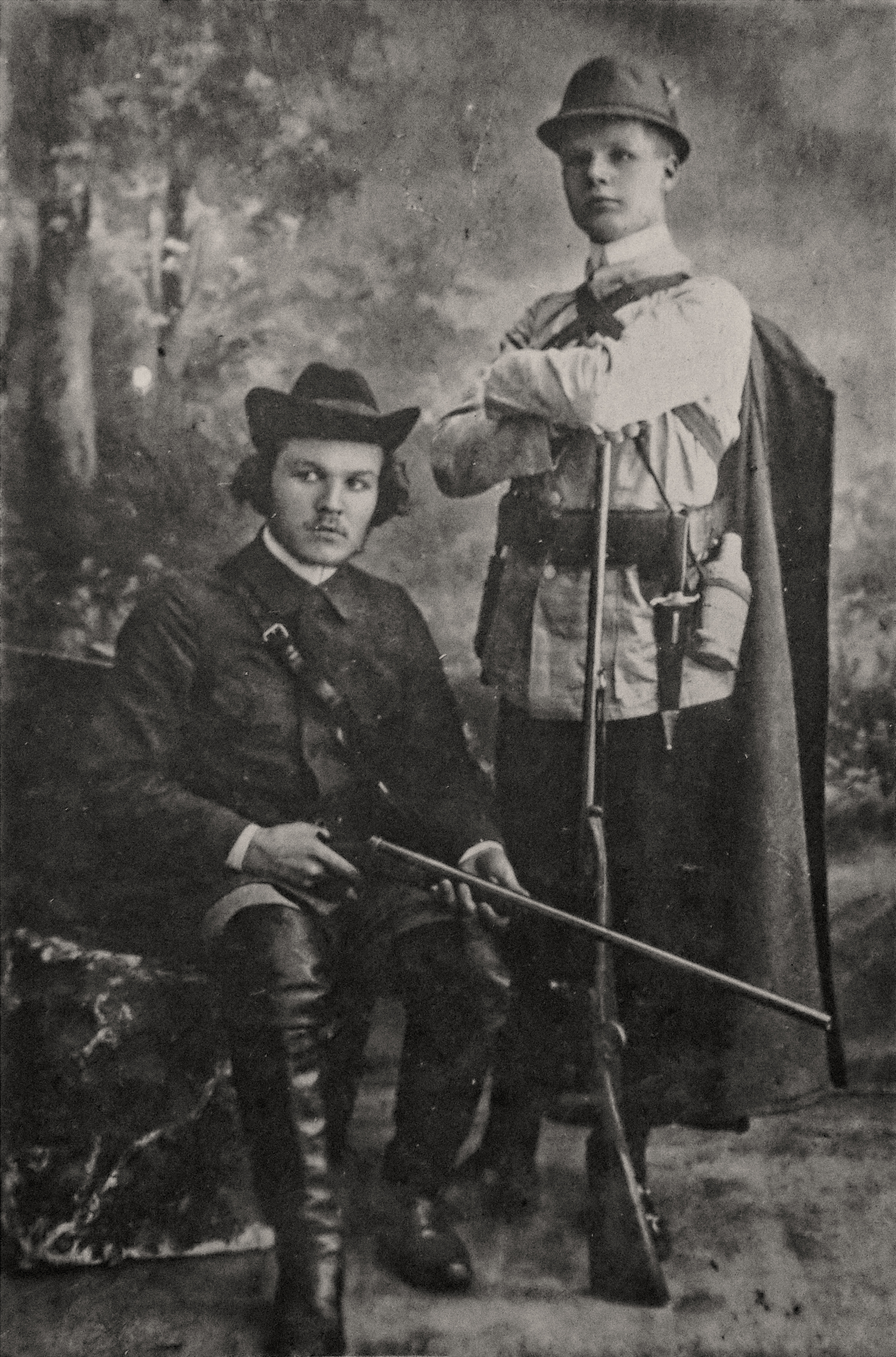 Петр Андреевич Ларионов (сидит) Императорской охоты птичник и предположительно Богомолов Борис Дмитриевич